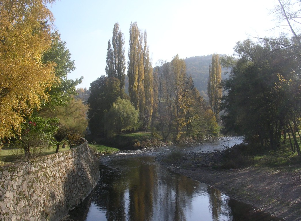 Confluent de l'alagnon et de l'alagnonnet à Massiac (Cantal - France)